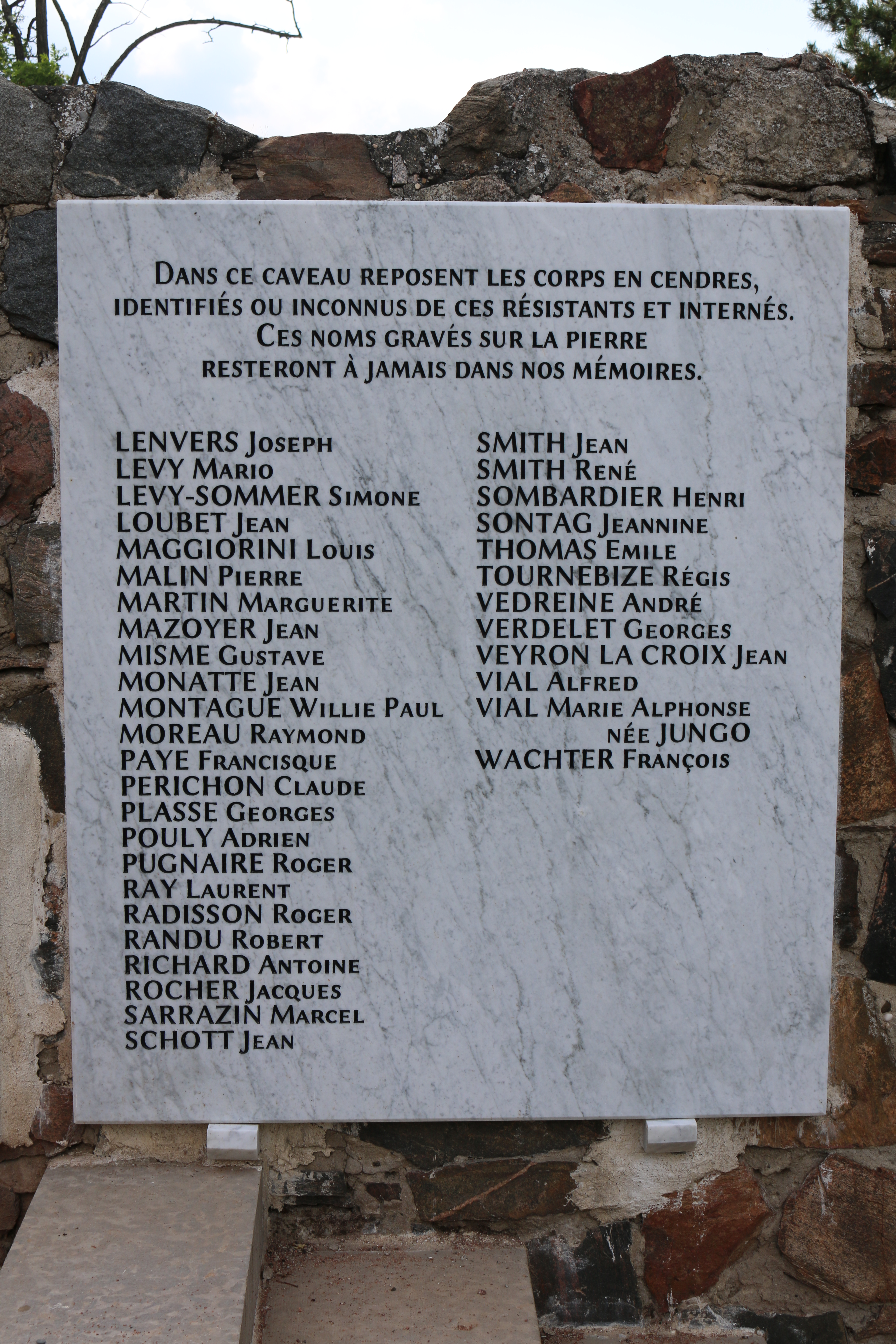 Plaque portant les noms des victimes du massacre du fort de Côte-Lorette